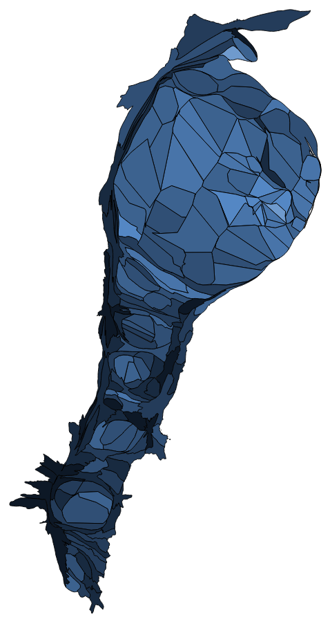 顏色對照表